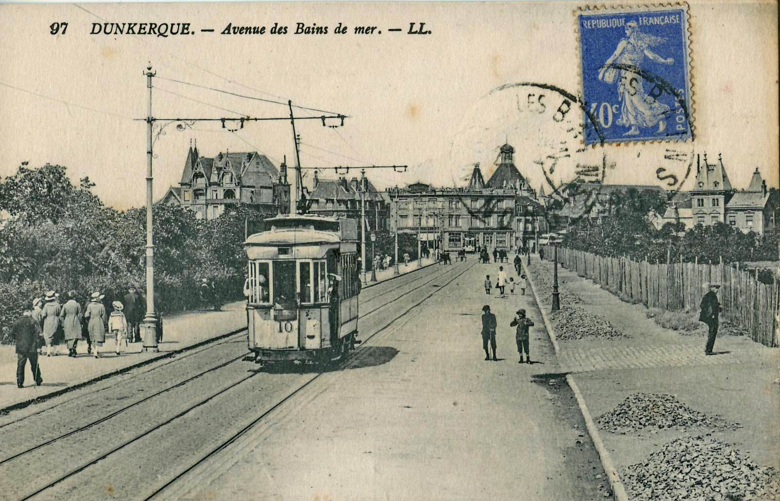 Carte postale ancienne éditée par LL n°97 : DUNKERQUE - Avenue des Bains de MerMotrice n°10 du tramway de Dunkerque, après fermeture des plate-formes